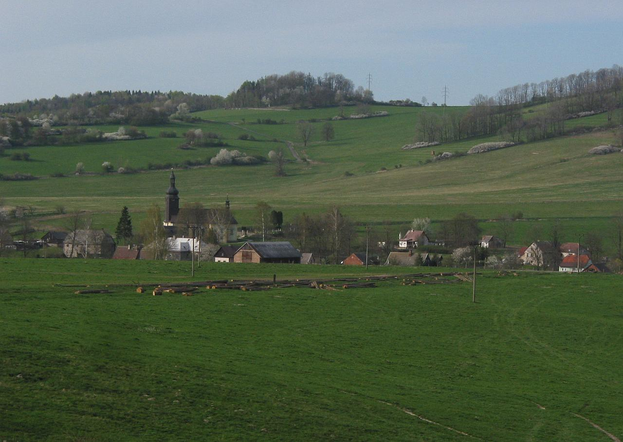 Pohled na střed vesnice Kerhartice (součást města Česká Kamenice) s barokním kostelem sv. Marie Magdalény